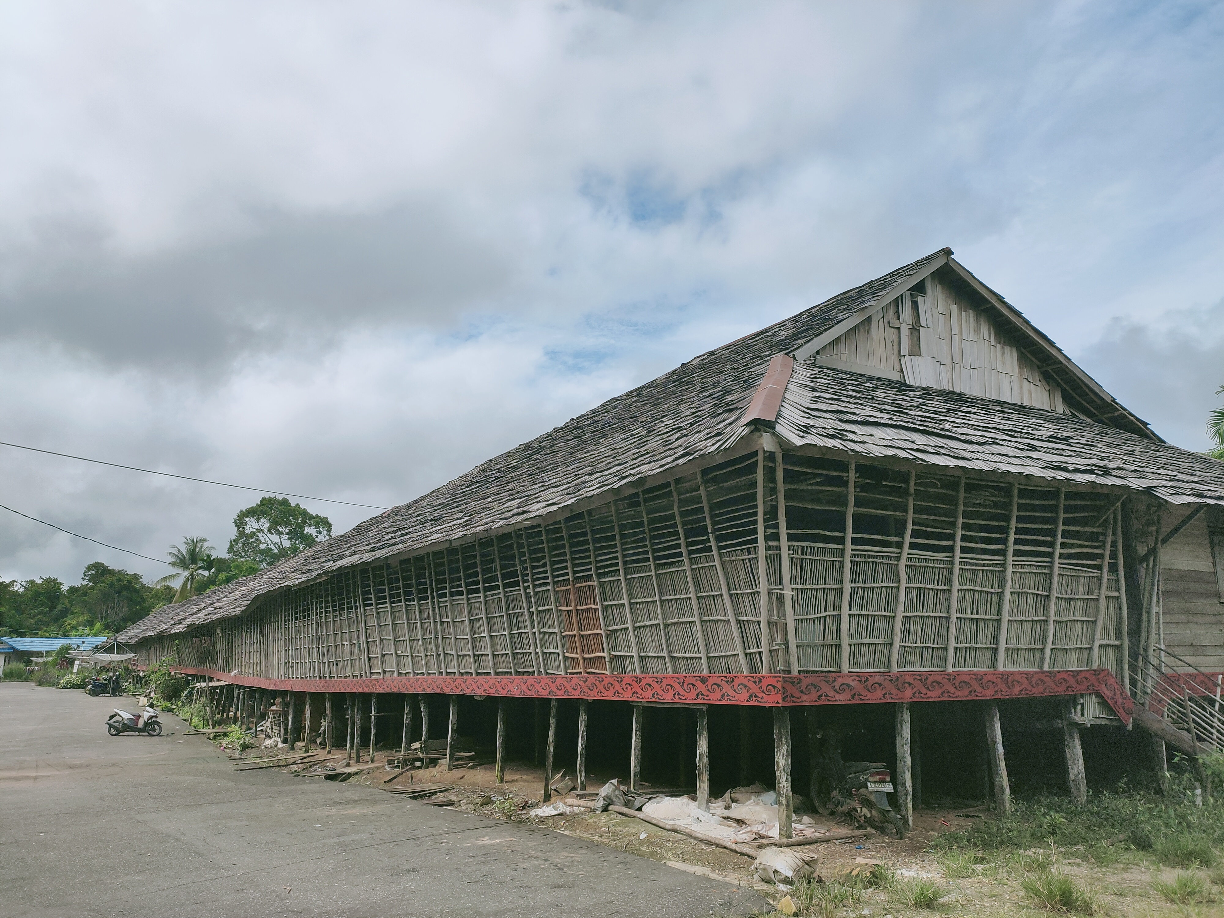 Rumah Betang Ensaid Panjang Kabupaten Sintang, Kalimantan Barat